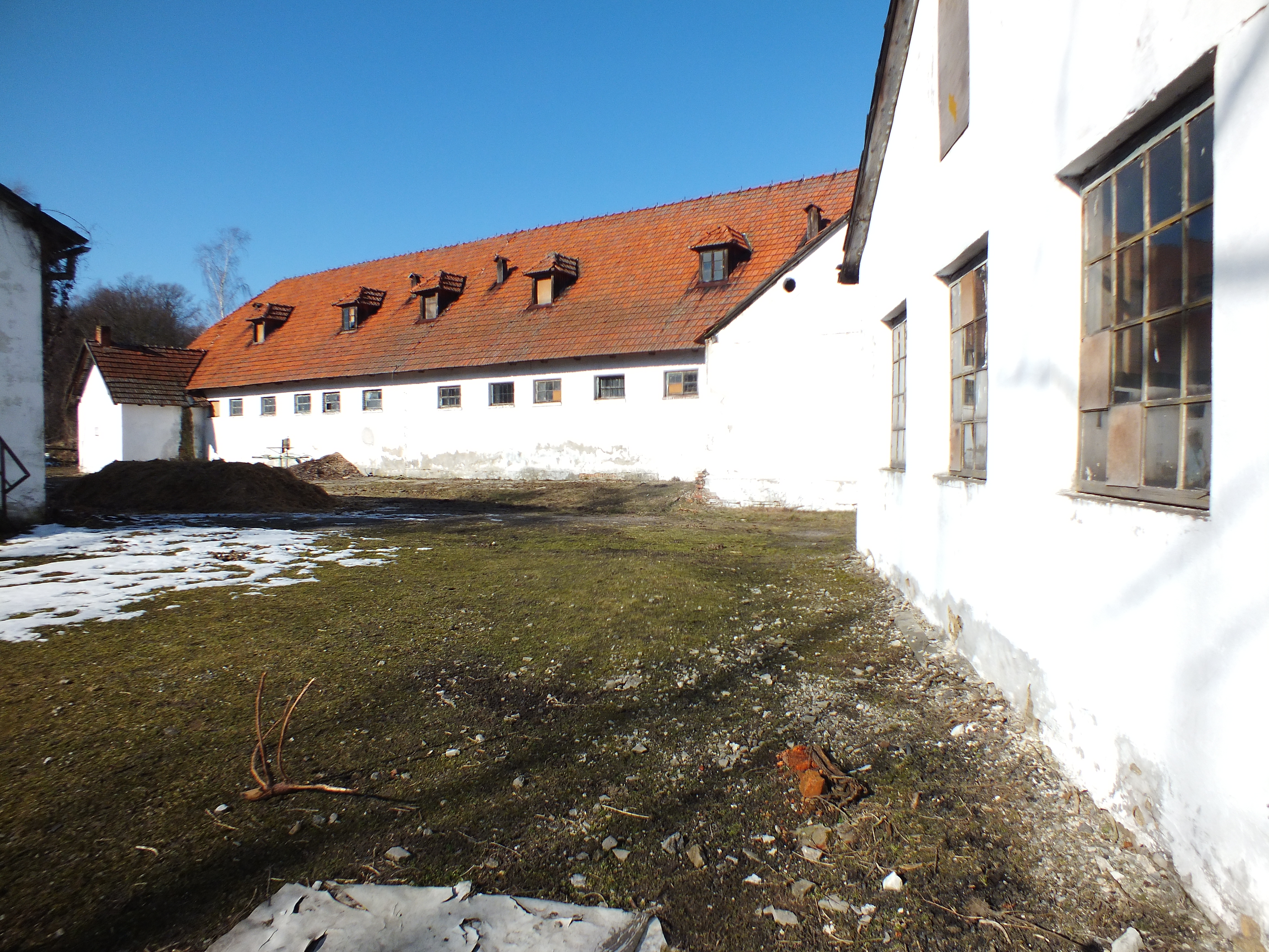 Biała Wielka, zespół dworski, XIX/XX